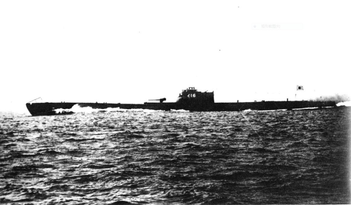 1940年3月9日，海试中的伊号第一六潜水舰